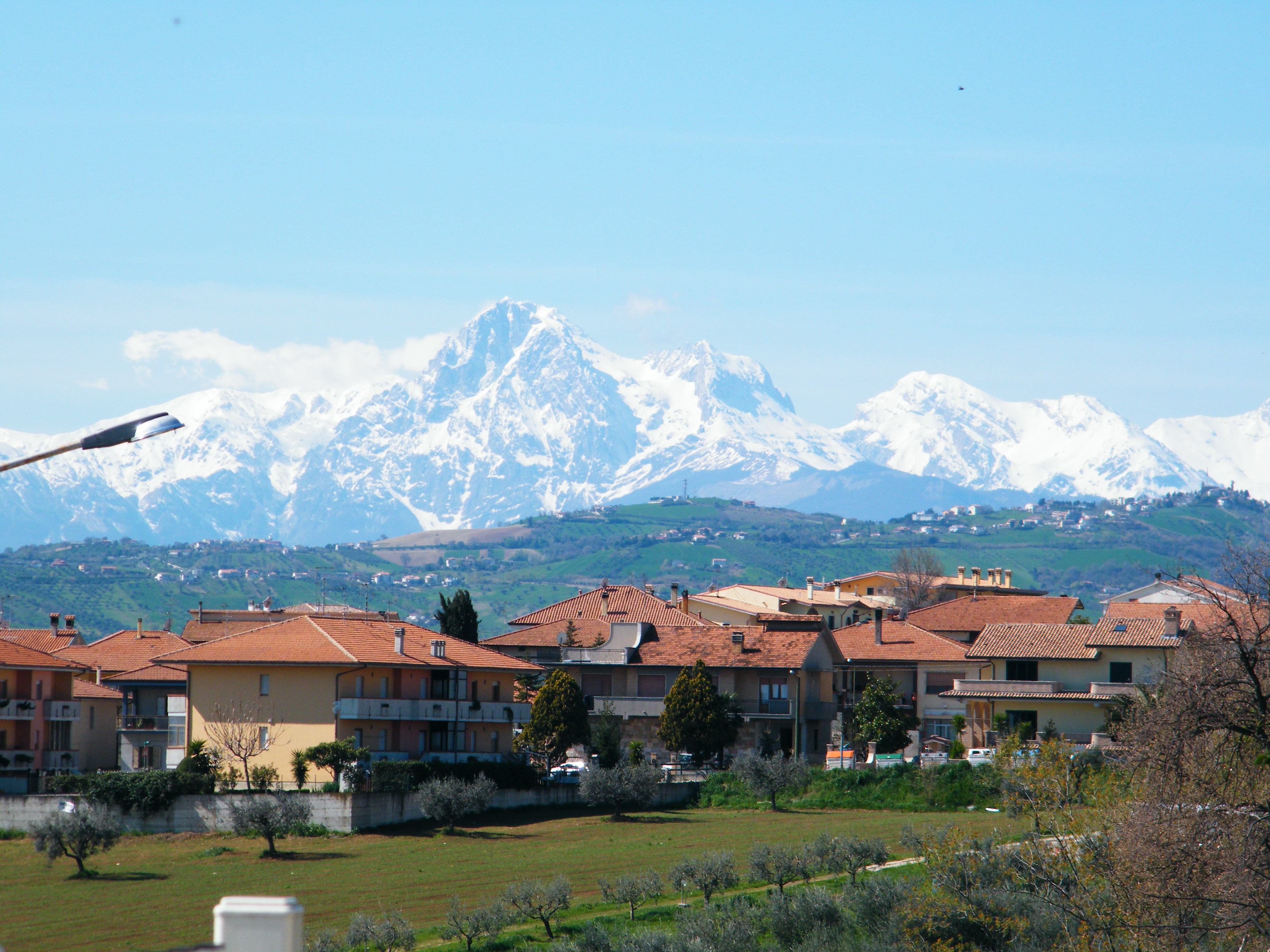 Vista Gran Sasso da Mosciano Sant'Angelo